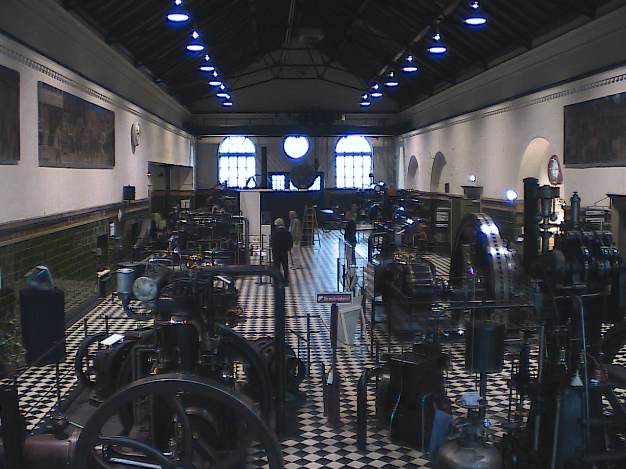 Industry Museum Denmark, machine hall